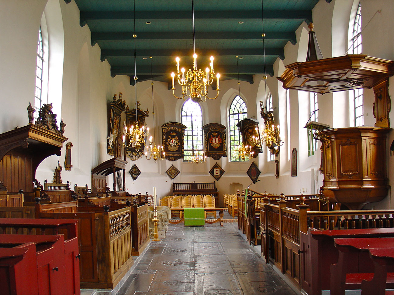 Mariakerk van Buitenpost